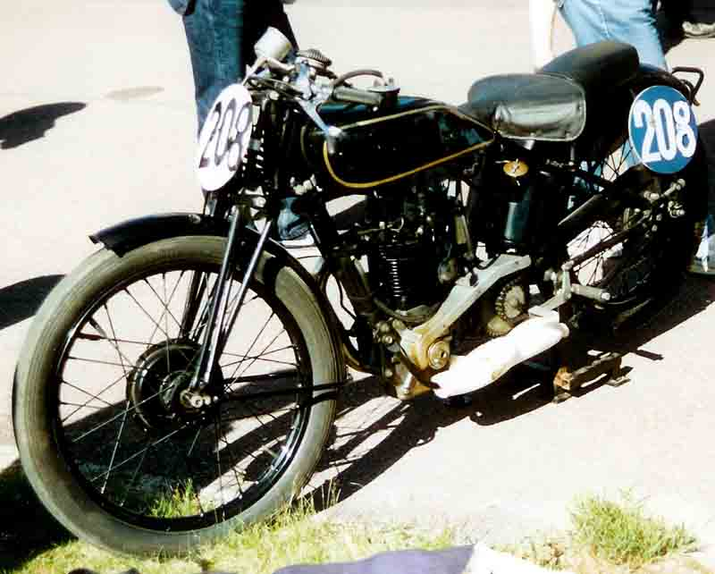 Velocette KTT 350 cc Racer 1929